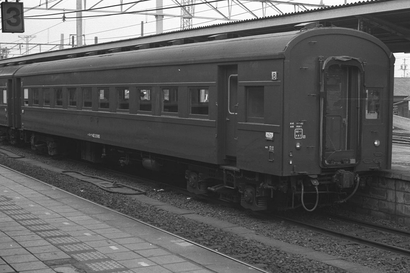 At Matsumoto Sta., Nagano. JNR Suhafu42 2195(スハフ42 2195、松本駅にて）。